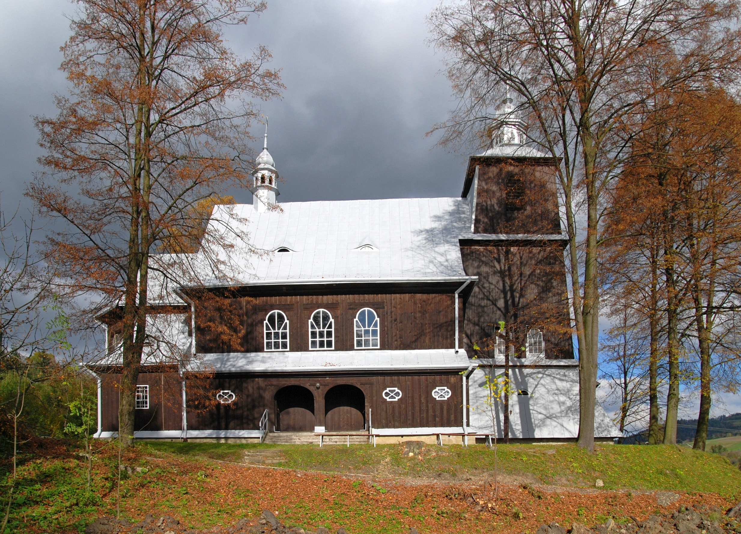 wieś Kąclowa